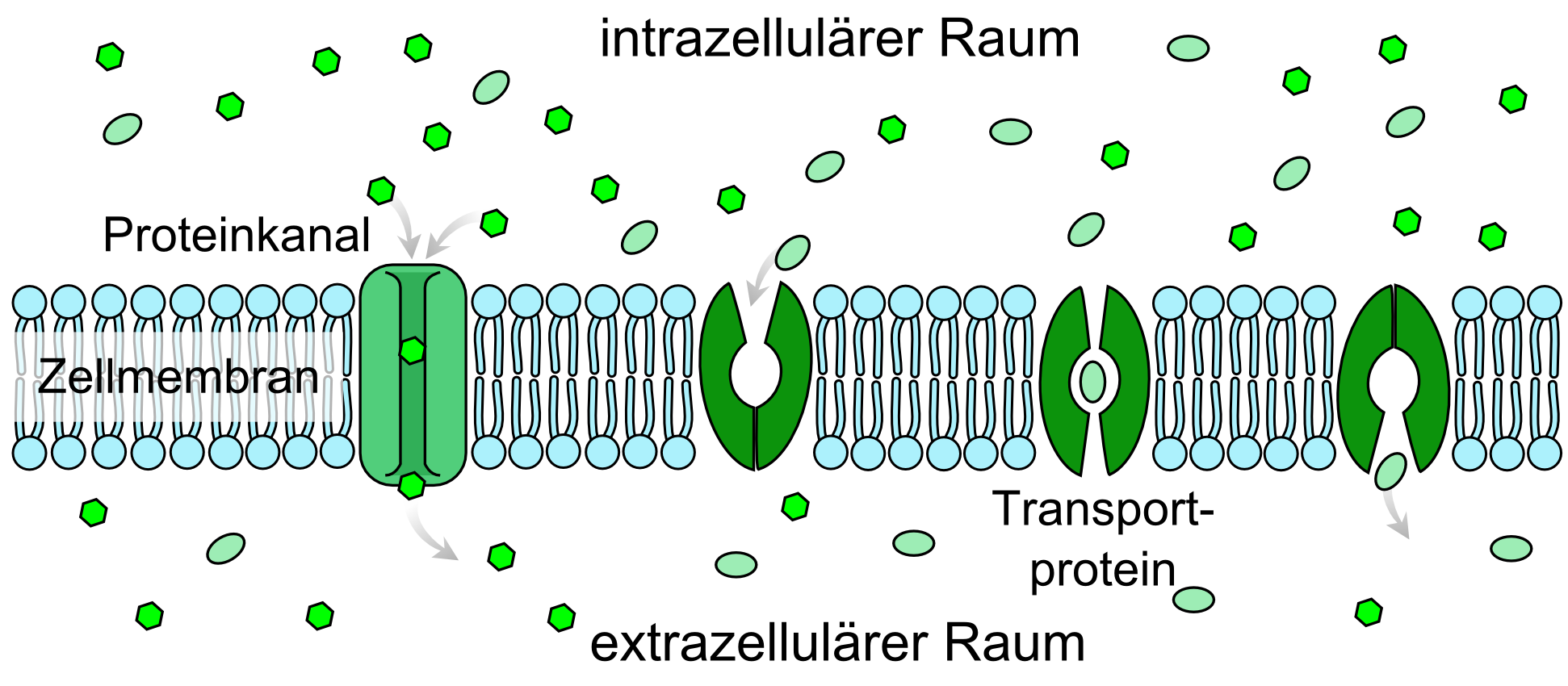 Schematische Darstellung der Diffusionsvorgänge an der Zellmembran.